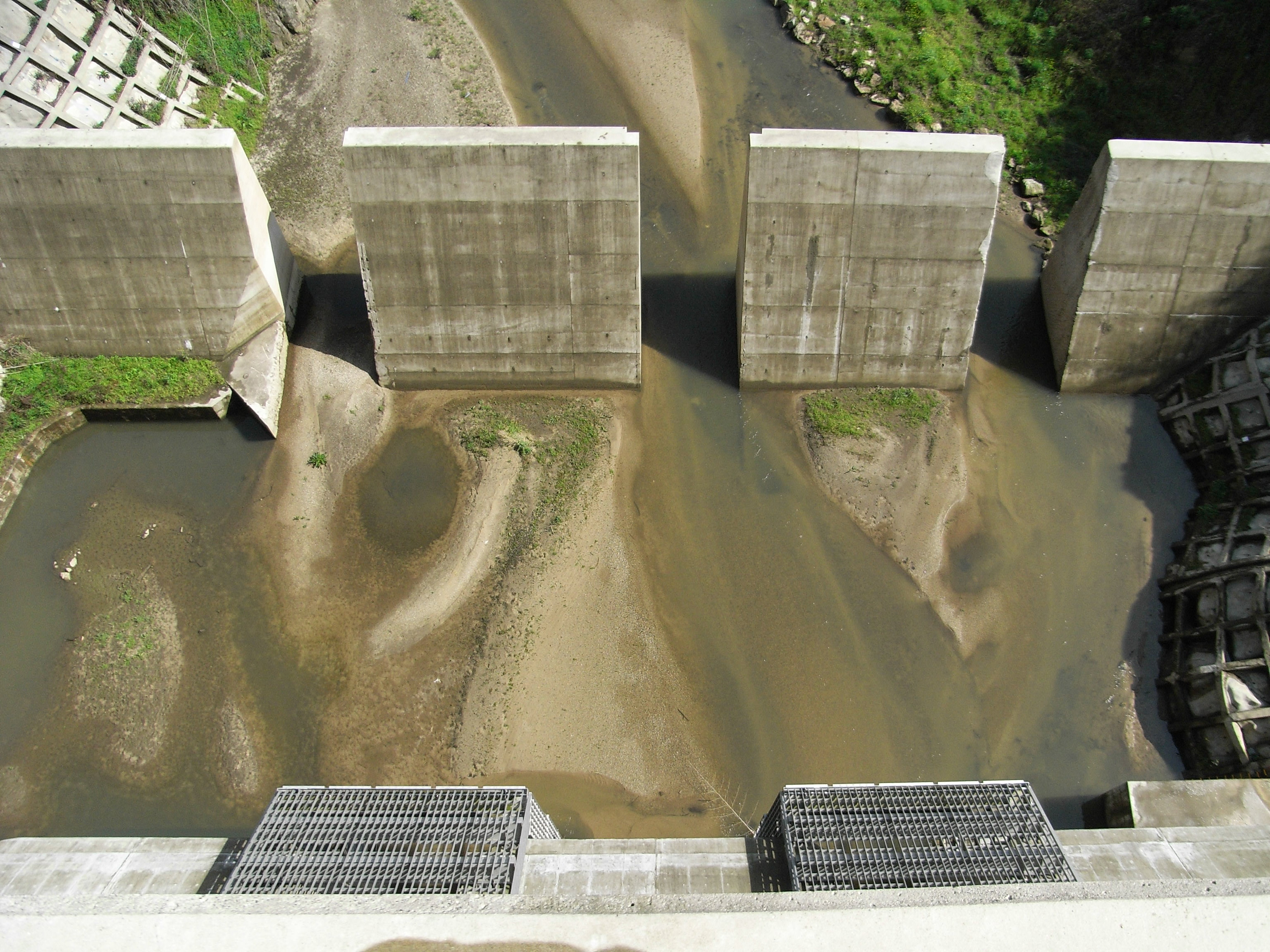 Dam